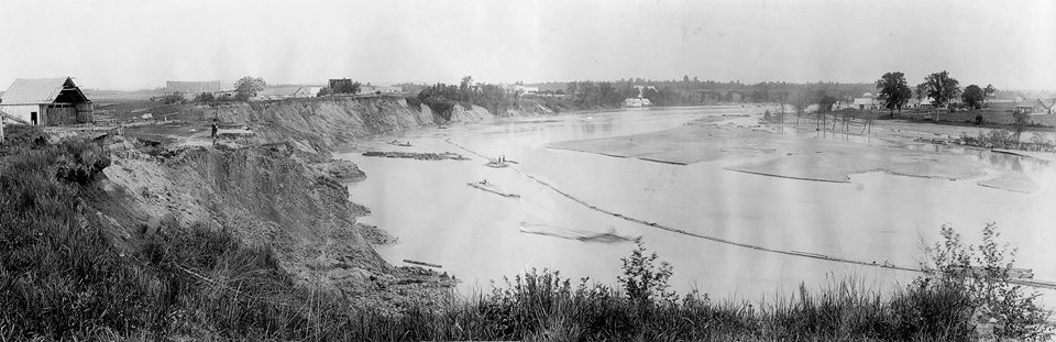 Photo d'archive nous montrant l'érosion de la rivière Sainte-Anne entre Saint-Casimir et Sainte-Anne-de-la-Pérade à la hauteur de la ferme familliale des Douville. « En 1894, l'éboulis de Saint-Alban provoque l'ensablement du lit de la rivière Sainte-Anne. Avant l'éboulis de 1894, les Péradiens pratiquent le flottage du bois sur la rivière Sainte-Anne. La métamorphose de l'environnement provoque un virage dans l'économie de Sainte-Anne-de-la-Pérade. Le déclin de l'industrie forestière amène le développement de l'industrie laitière, la culture maraîchère et l'arboriculture. Des manufactures, des petites industries, des ateliers d'artisans ainsi que des commerces naissent durant la dernière partie du 19e siècle. Cette catastrophe naturelle marque la fin de la navigation commerciale, le ralentissement du transport du bois par flottage et le déclin de l'exploitation des moulins à scie situés en amont du village, sur les rives des rivières Gendron, Charest et Sainte-Anne. » – Société d'histoire de Sainte-Anne de la Pérade